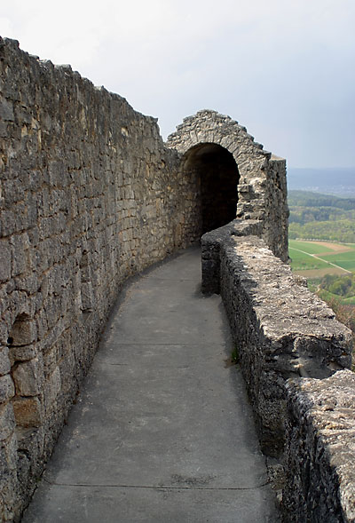 Ruine Farnsburg